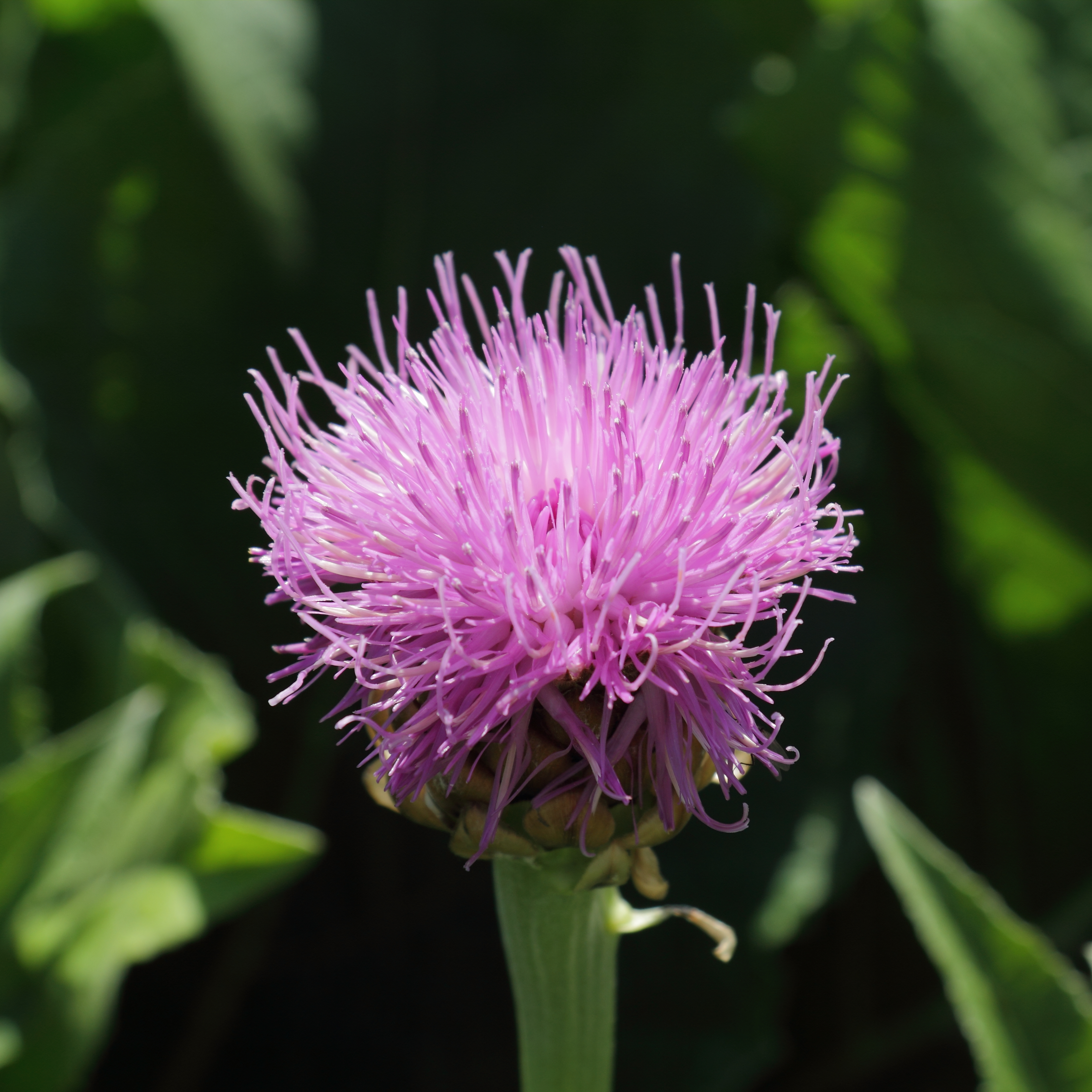 Rhaponticum scariosum ssp. rhaponticum, identifierad med hjälp av befintlig skylt vid Bergianska trädgården.